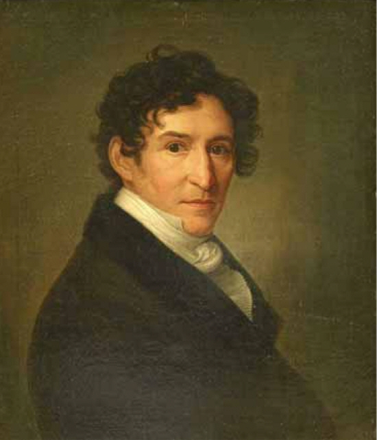 Bildnis Ludwig Devrient, Berlin 1831, Öl auf Leinwand, 58 x 50 cm, signiert und datiert: CW Wohlien 1831 Theaterwissenschaftliche Sammlung der Universität zu Köln, Schloss Wahn, Inv.Nr. 30096 (Sammlung Niessen)